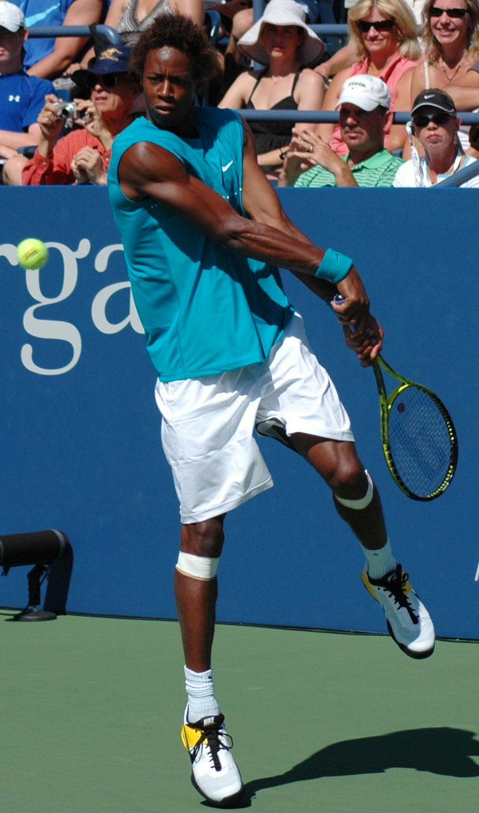 Gael Monfils US Open 2009